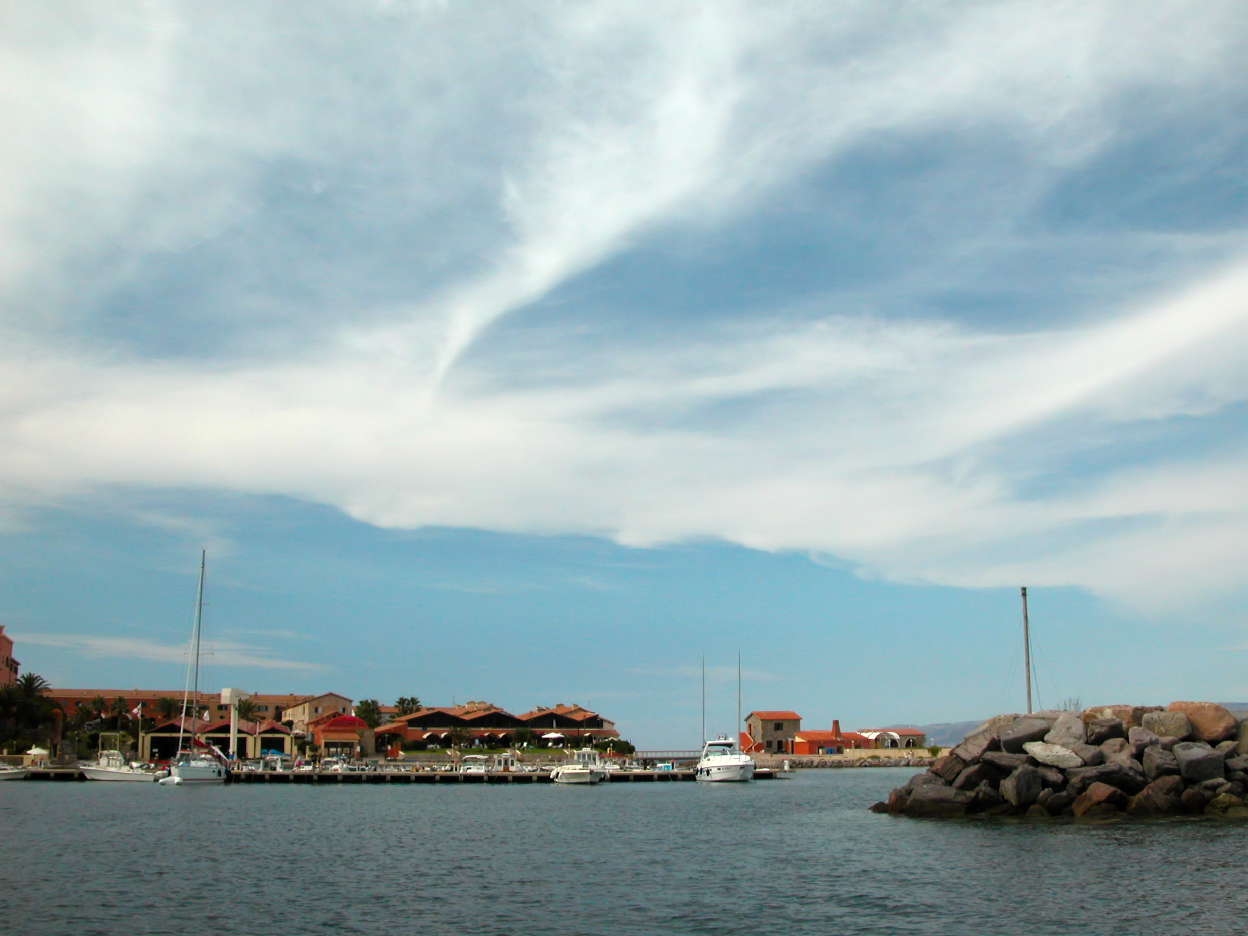 Isola Piana, near Isola di San Pietro, Italy